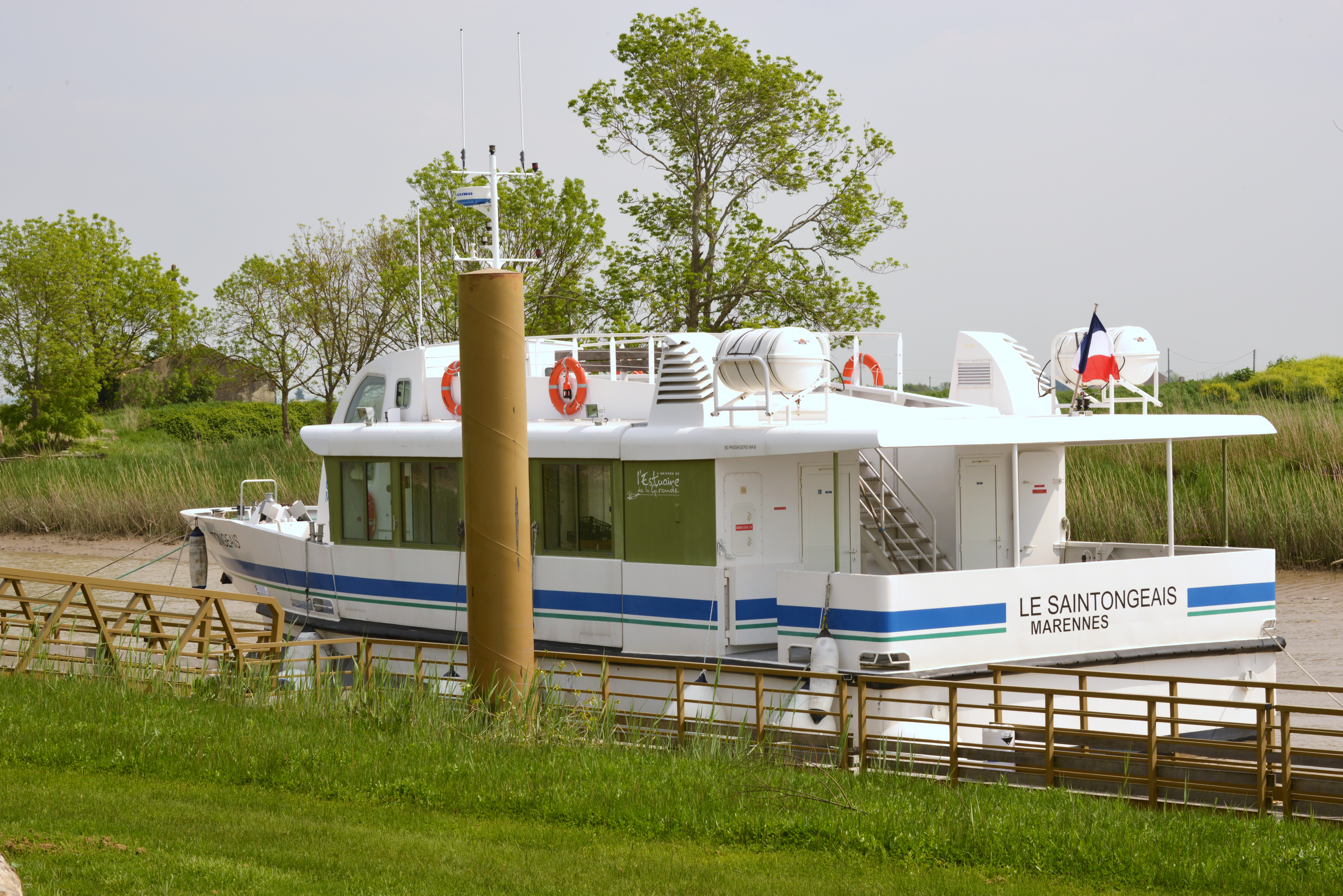 La vedette à passagers « Le Saintongeais » amarrée à son embarcadère dans le port de Vitrezay. Ce navire à passagers est utilisé pour effectuer des promenades dans l’estuaire de la Gironde. « Le Saintongeais » a été construit par le Chantier Naval Delavergne (Avrillé, Vendée) en 2008. Il mesure 19,70 mètres de long et 6,30 mètres de large. Il peut embarquer 80 passagers et 20 vélos. Motorisation Volvo : deux moteurs de 404 kw chacun (2 x 550 cv). C’est une vedette à passagers de 4ème catégorie. Il appartient au Conseil Général de la Charente-Maritime. Port de Vitrezay (commune de Saint-Sorlin-de-Conac), Charente-Maritime, France.